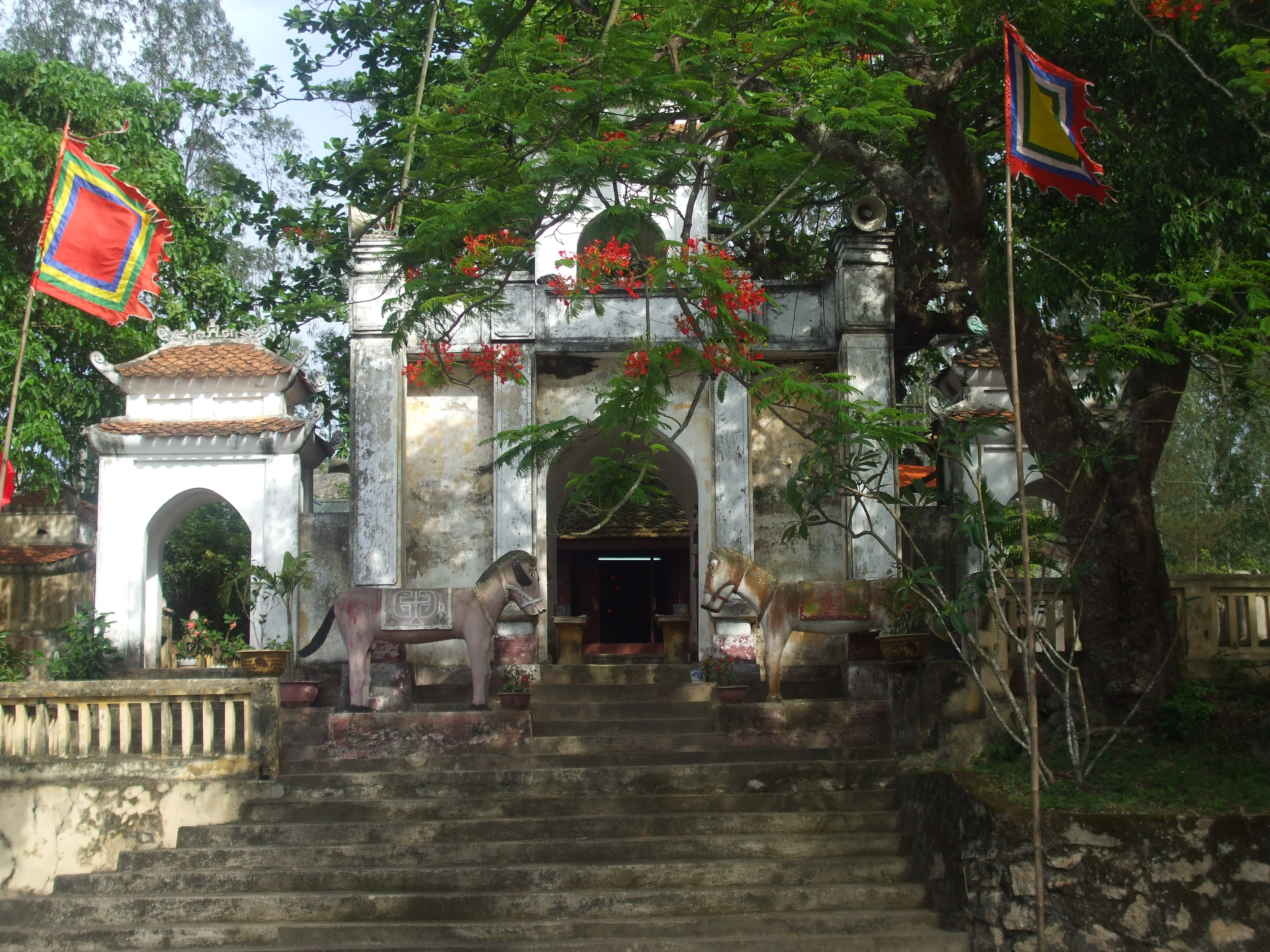 Cổng dẫn vào đền thờ Tô Hiến Thành tại thị xã Sầm Sơn, Thanh Hóa, Việt Nam.